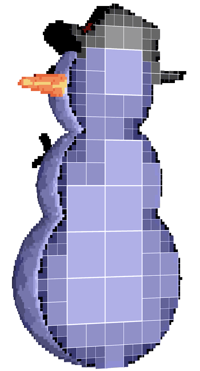 Пример построения разреженного воксельного октодерева (Sparse Voxel Octree) на воксельной модели снеговика